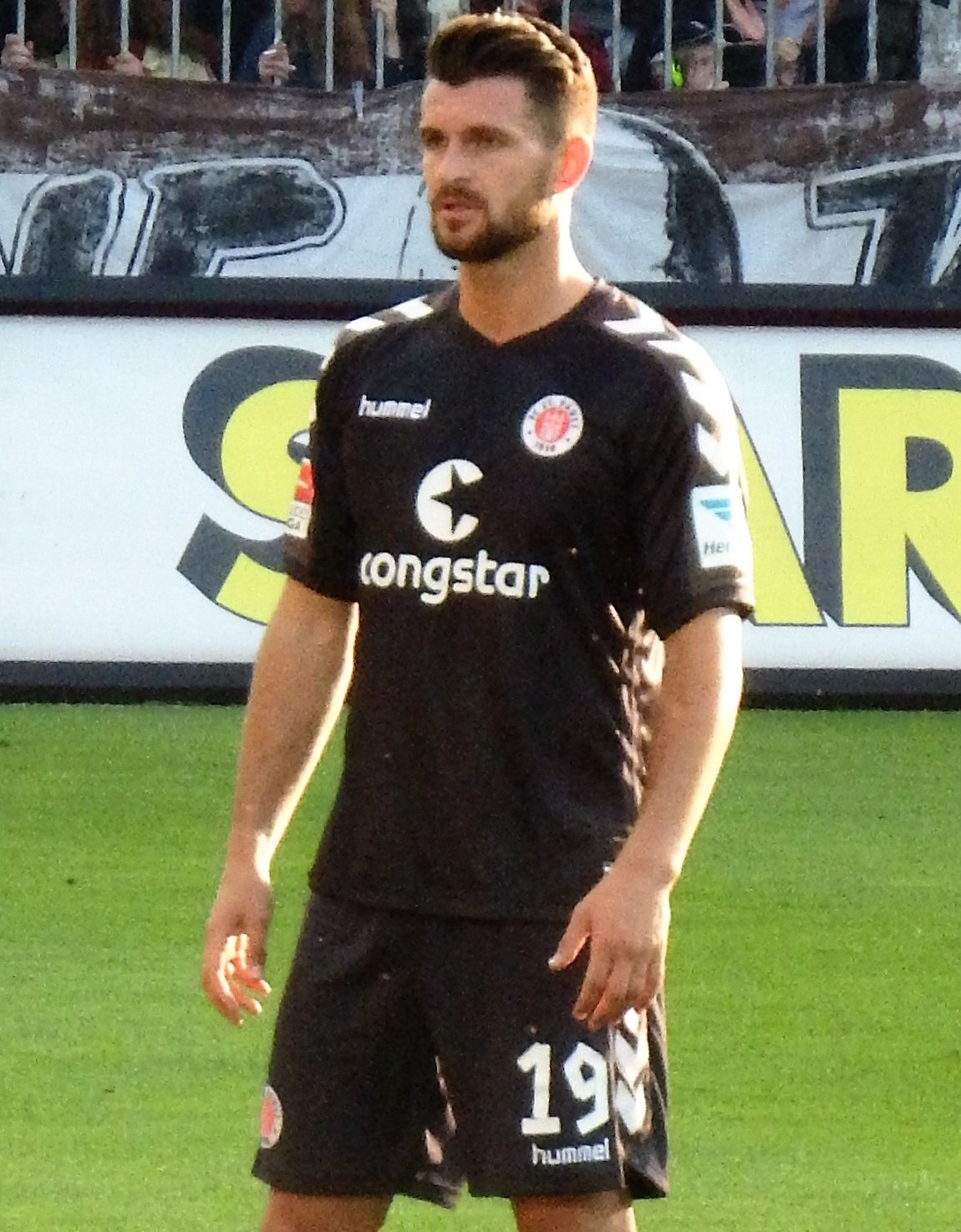 Enis Alushi beim FC St.Pauli